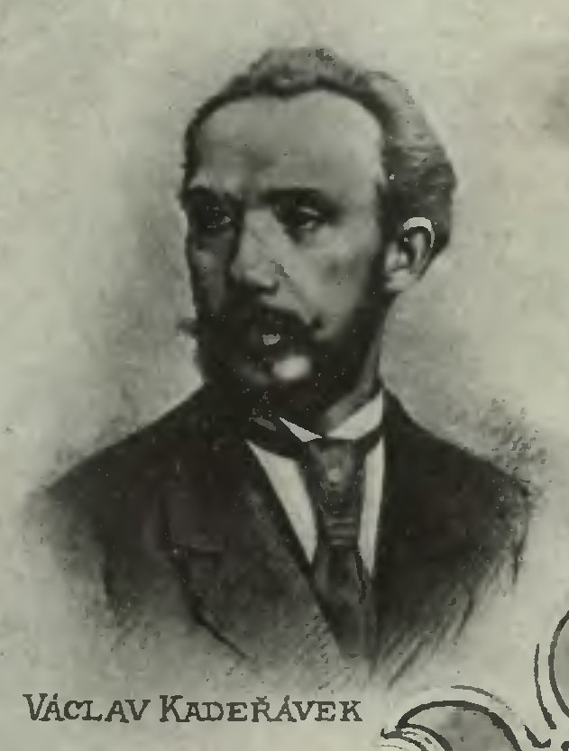 Portrét – Václav Kadeřávek (1835 - 1881), Český konstruktér a literát.